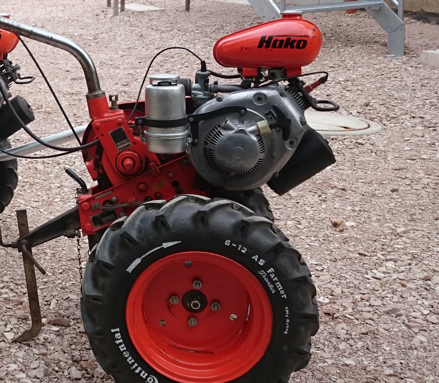 Das Bild zeigt eine HAKOrette 500RG (Bestellnummer: 5004).